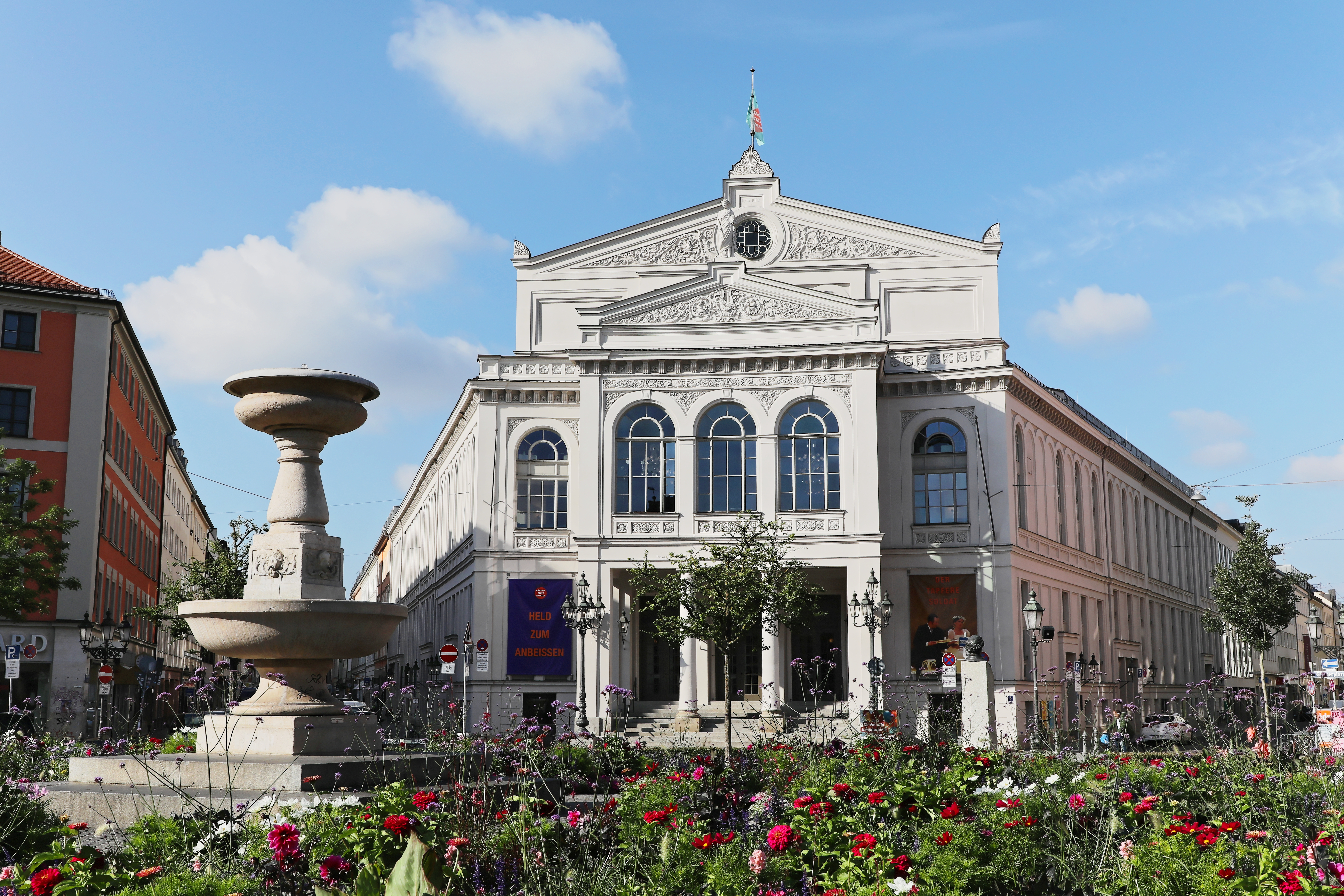 Totalen und Details vom Gebäude des Staatstheaters am Gärtnerplatz, mit Blumenrabatte und Brunnen im Vordergrund